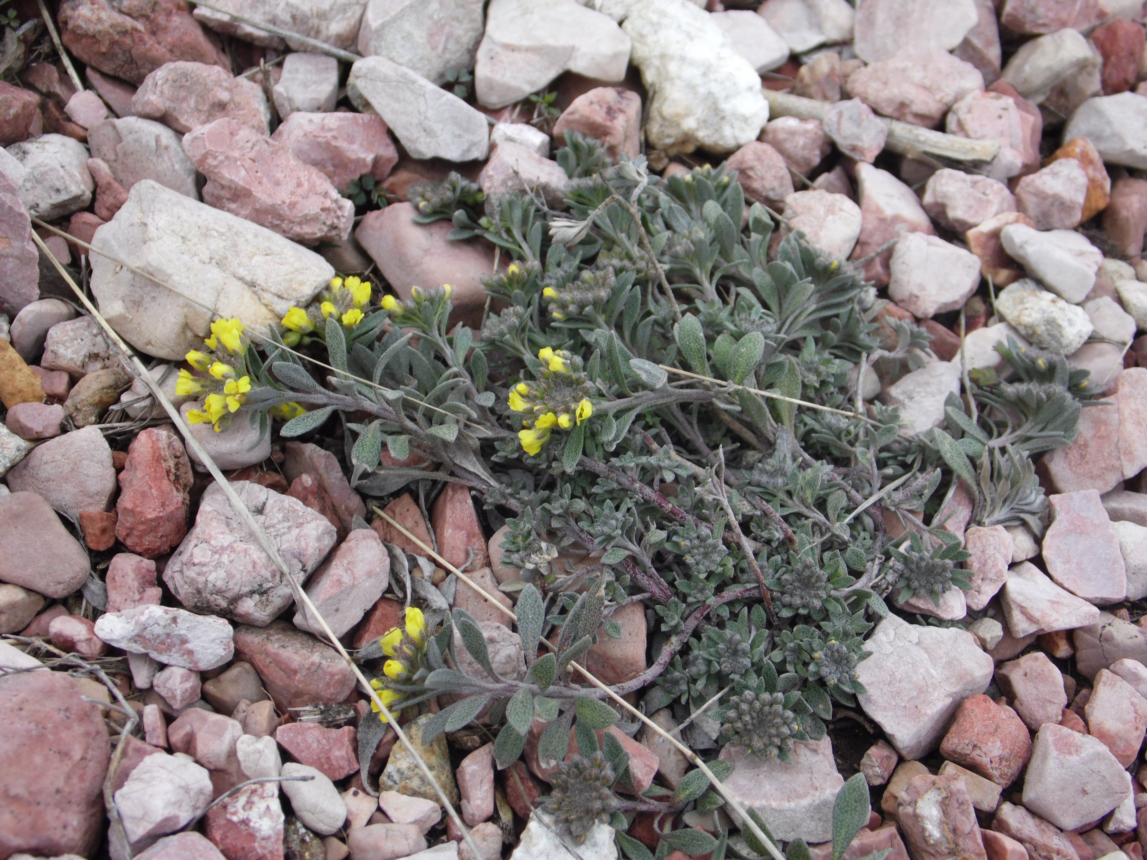 Hegyi ternye (Alyssum montanum) egy mészkősziklagyepen